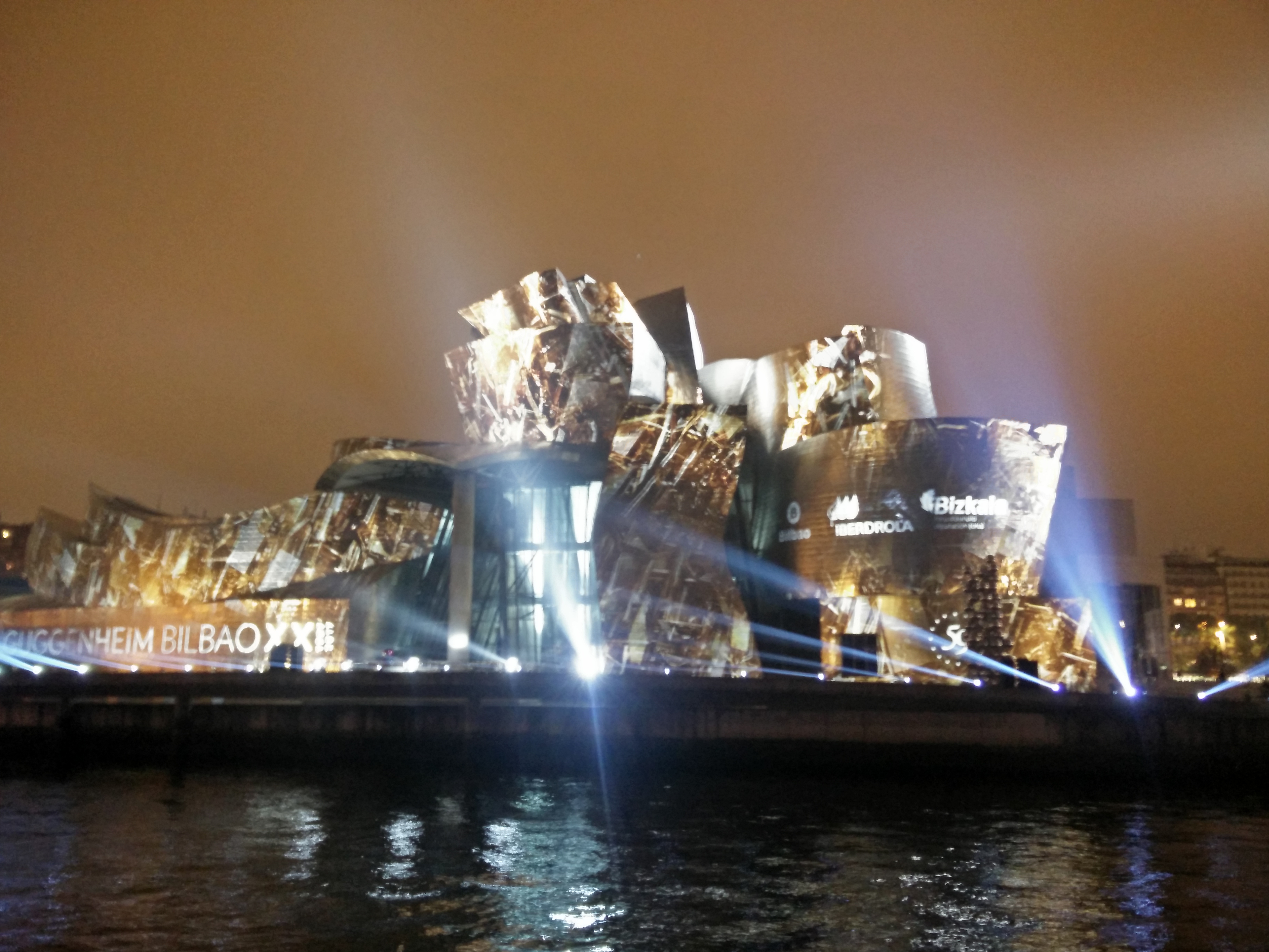 Guggenheim Bilbao Museoa, Bilbo